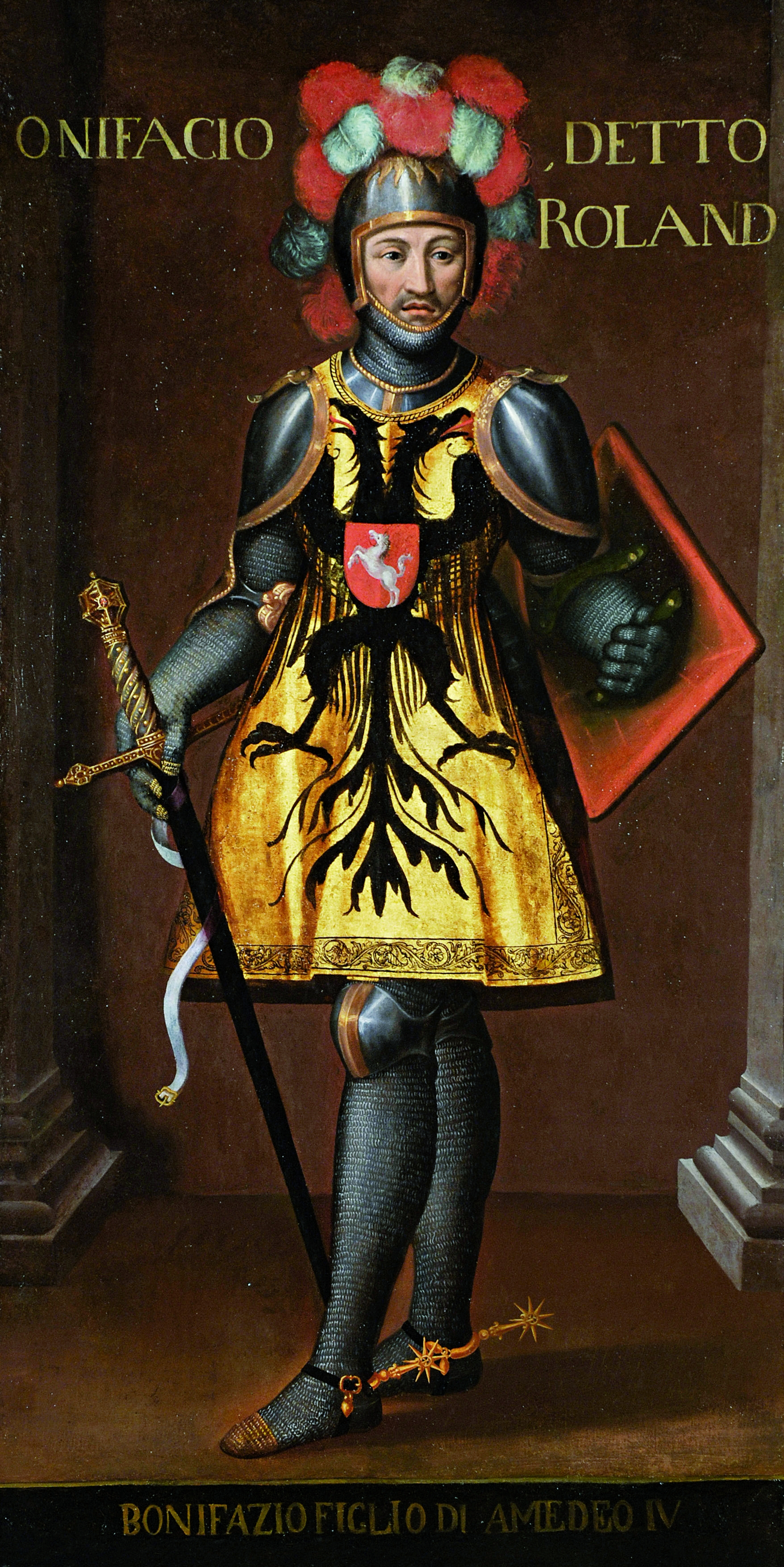 Ritratto del conte bonifacio di savoia